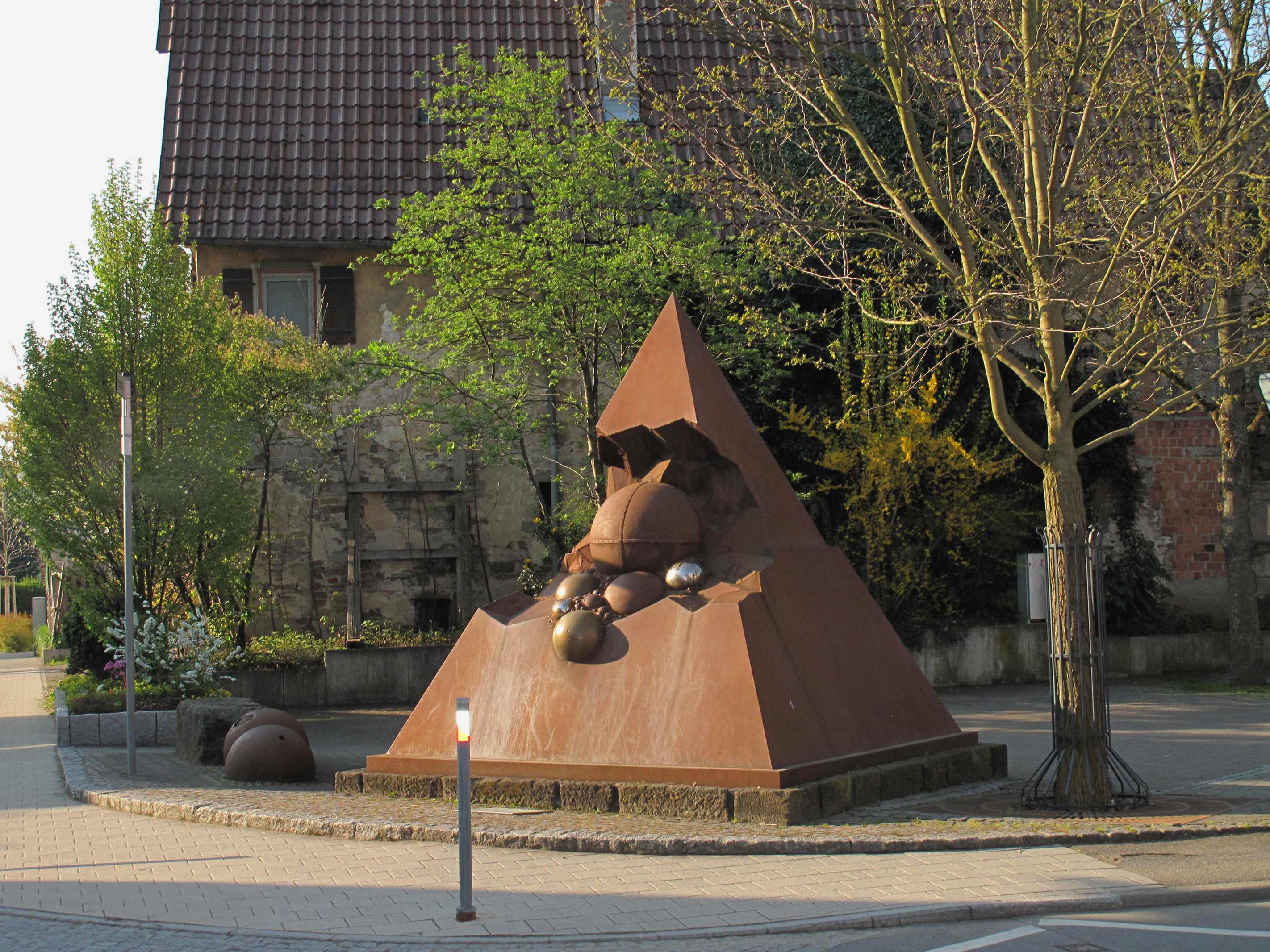 Lutz Ackermann, Pyramide, 1995, - Deutschland, Baden-Württemberg, Entringen, Volksbank